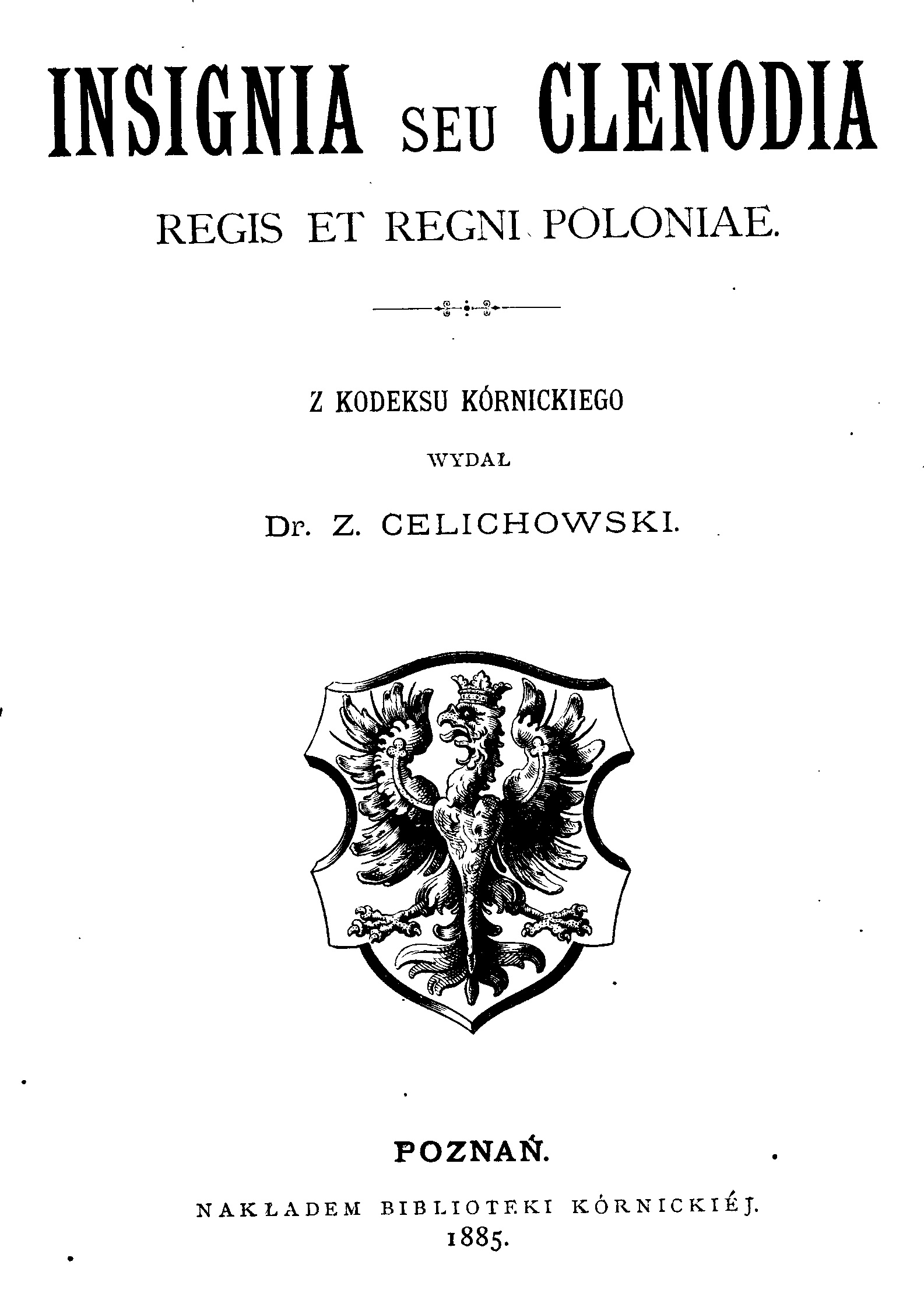 Zygmunt Celichowski, "Insignia seu clenodia regis et regni Poloniae. Z kodeksu kórnickiego", wyd. Z. Celichowski, Poznań 1885